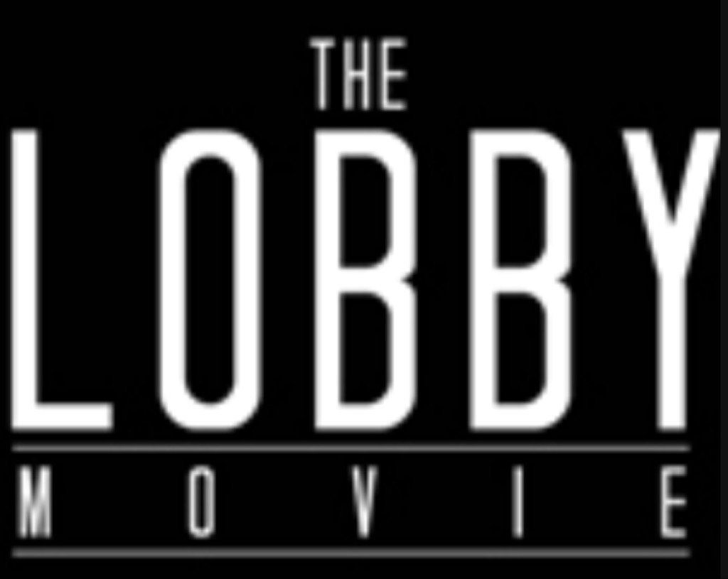 لوگو فيلم لابى